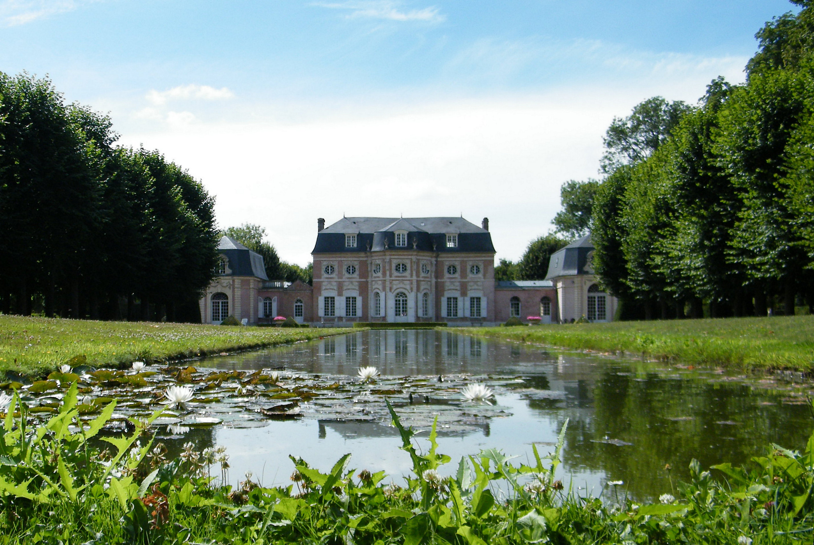 Château de Bagatelle à abbeville, Somme